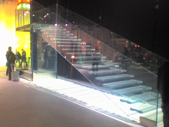 Stair in laminated glass, Escalera de vidrio laminado